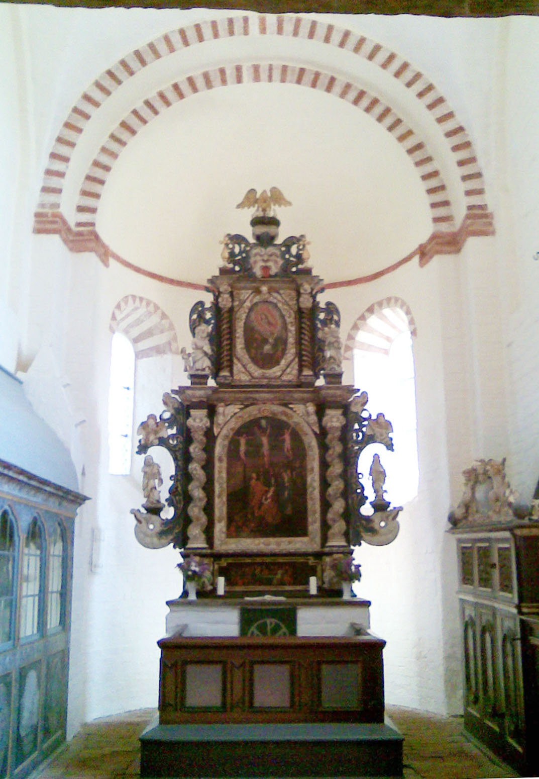 Kirche Schaprode, Altar